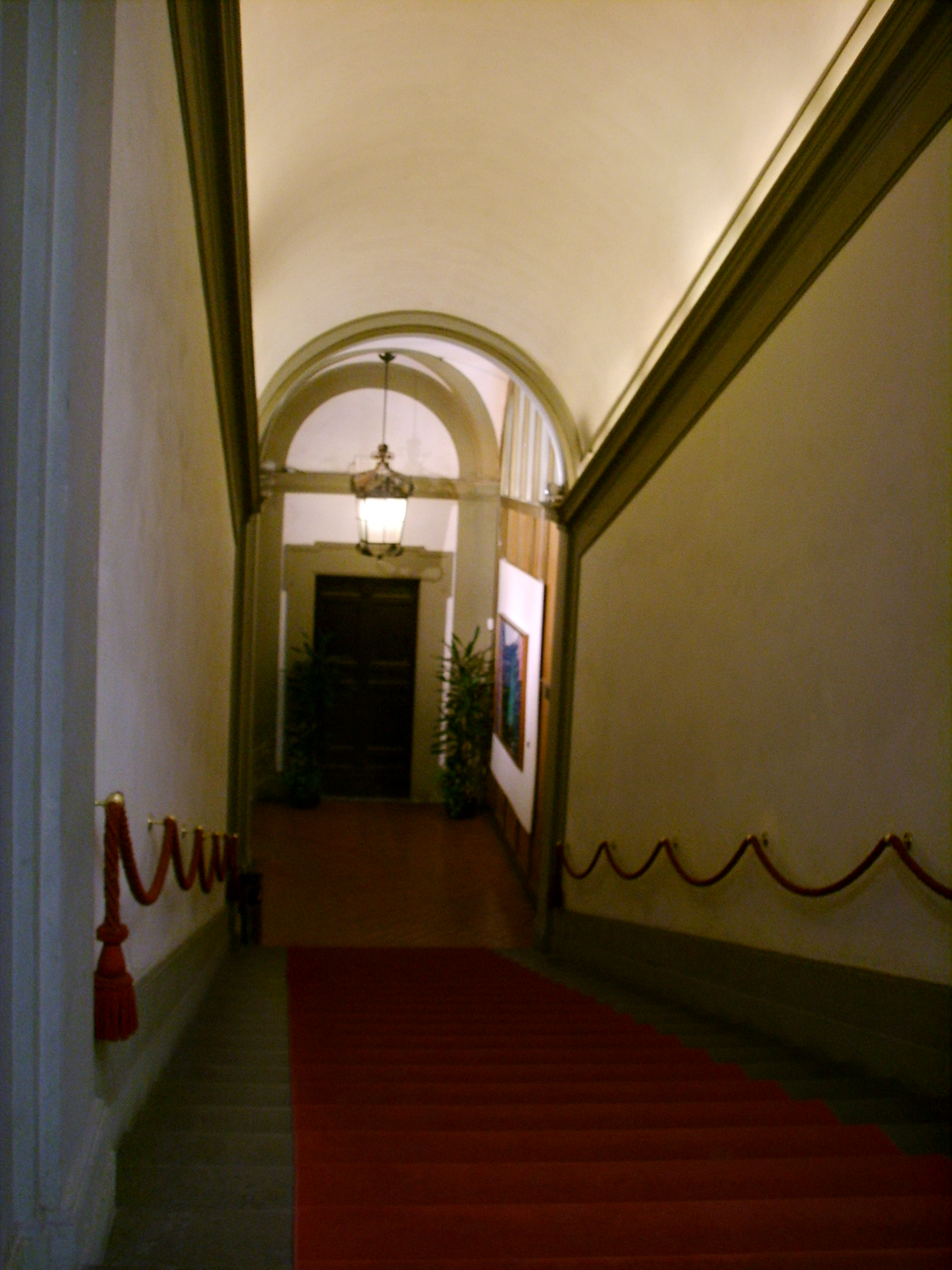 Palazzo Panciatichi, scalone